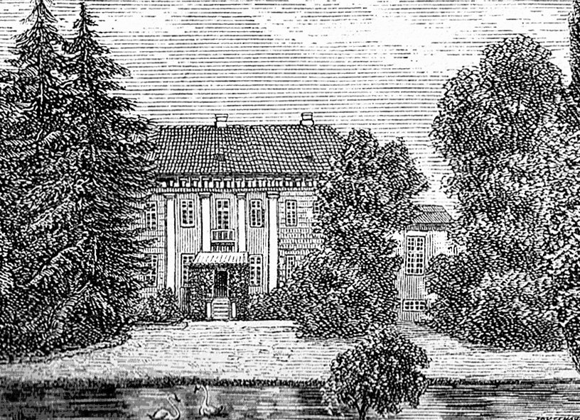 Corselitze er en gammel kongsgård, som nævnes i Kong Valdemar Sejrs jordebog. Gården ligger i Sønder Alslev Sogn, Falsters Sønder Herred, Maribo Amt, Stubbekøbing Kommune. Hovedbygningen er opført i 1775-1777